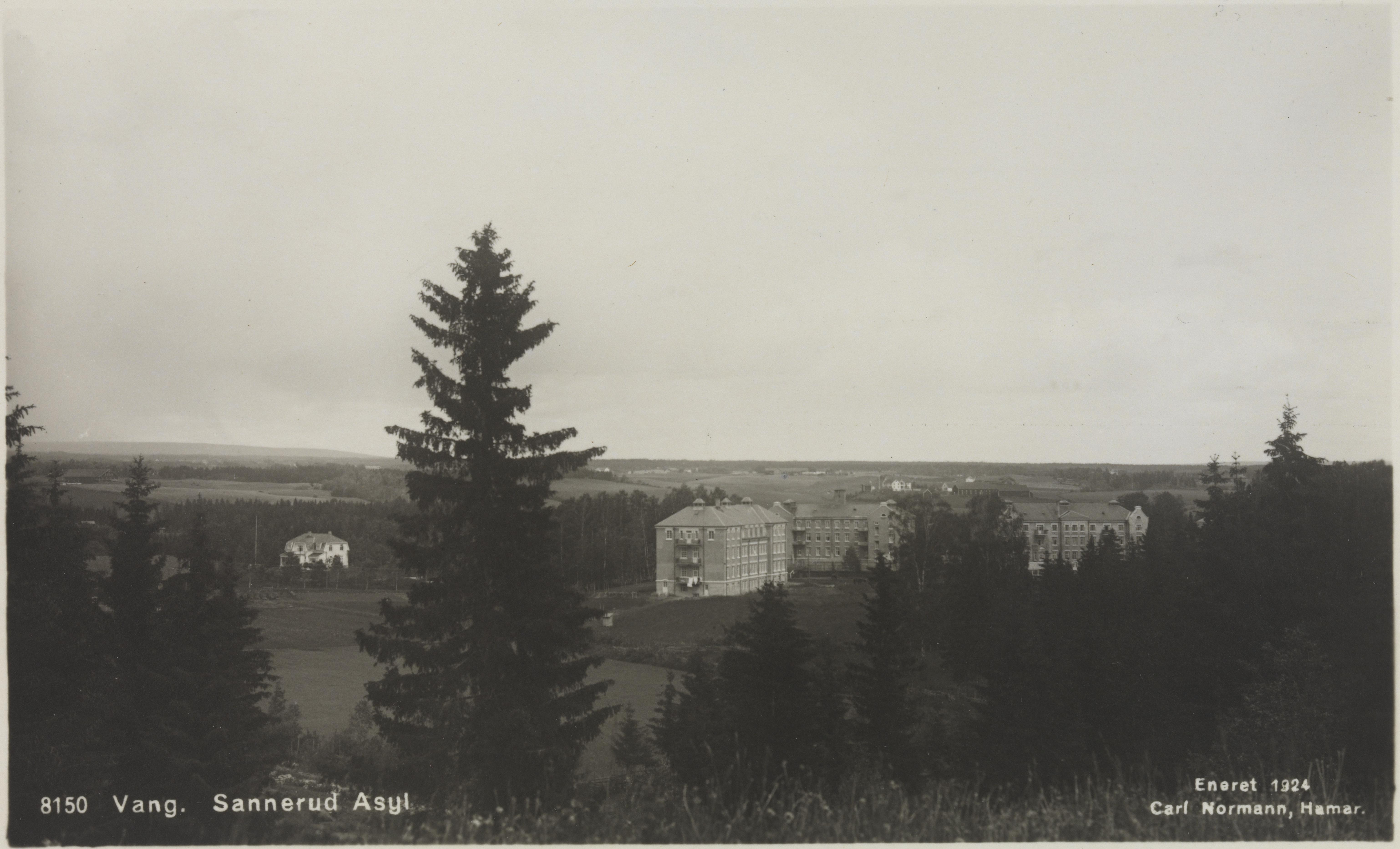 Bildet er hentet fra Nasjonalbibliotekets bildesamling Sanderud Sykehus, Stange, Hedmark